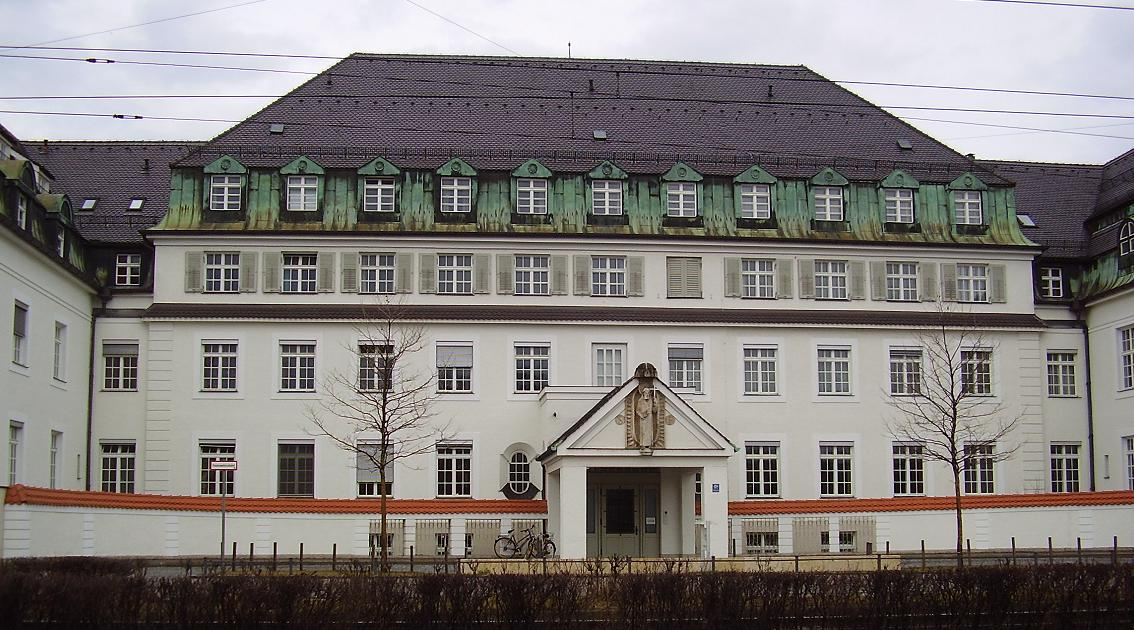 Krankenhaus Dritter Orden (hospital of the Third Order) in Munich (Germany)